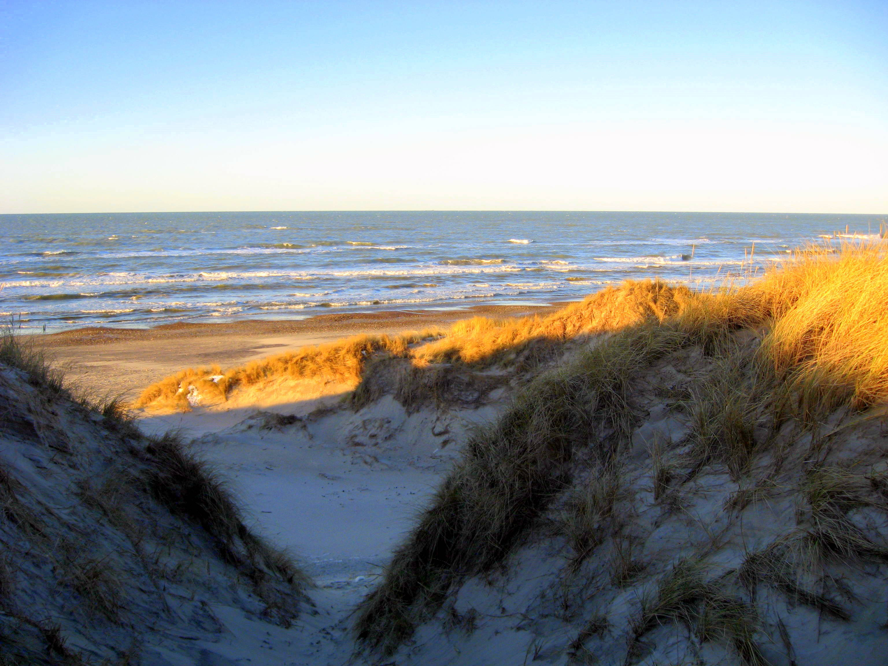 Kjærsgaard Strand, Nordjylland